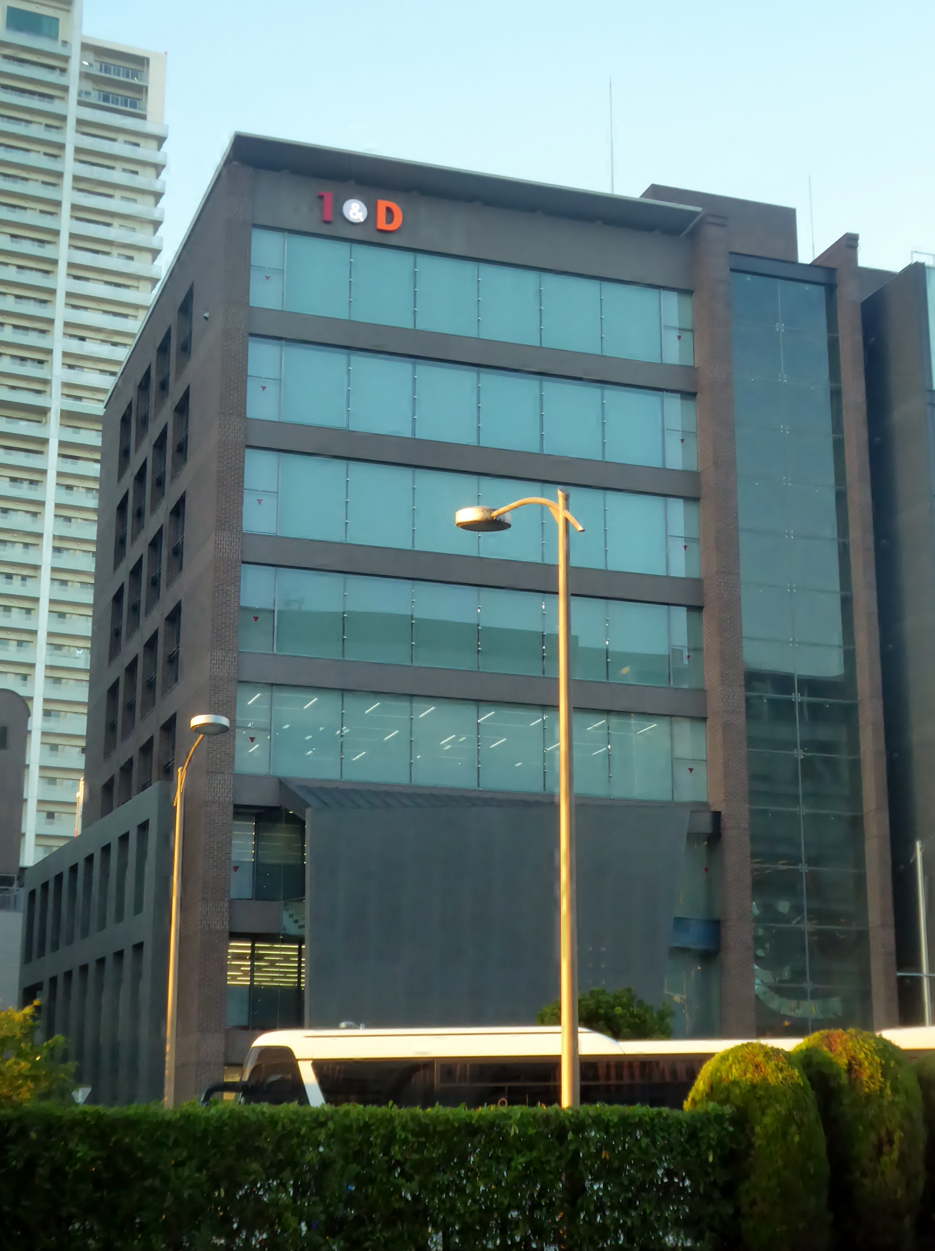 株式会社ワン・ダイニング本社を撮影。